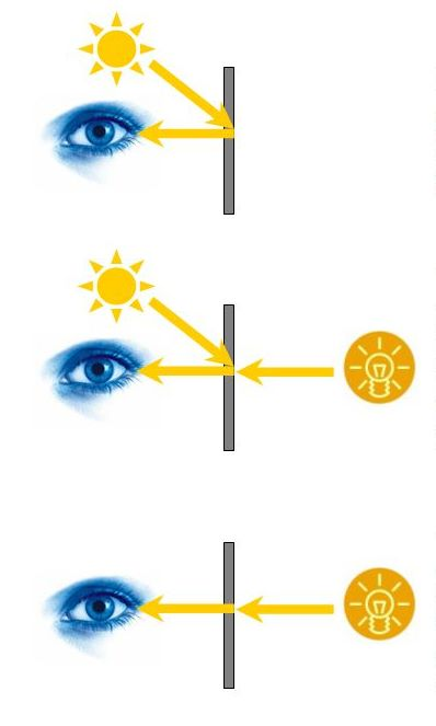 Darstellung Reflektiv / Transflektiv / Transmissiv